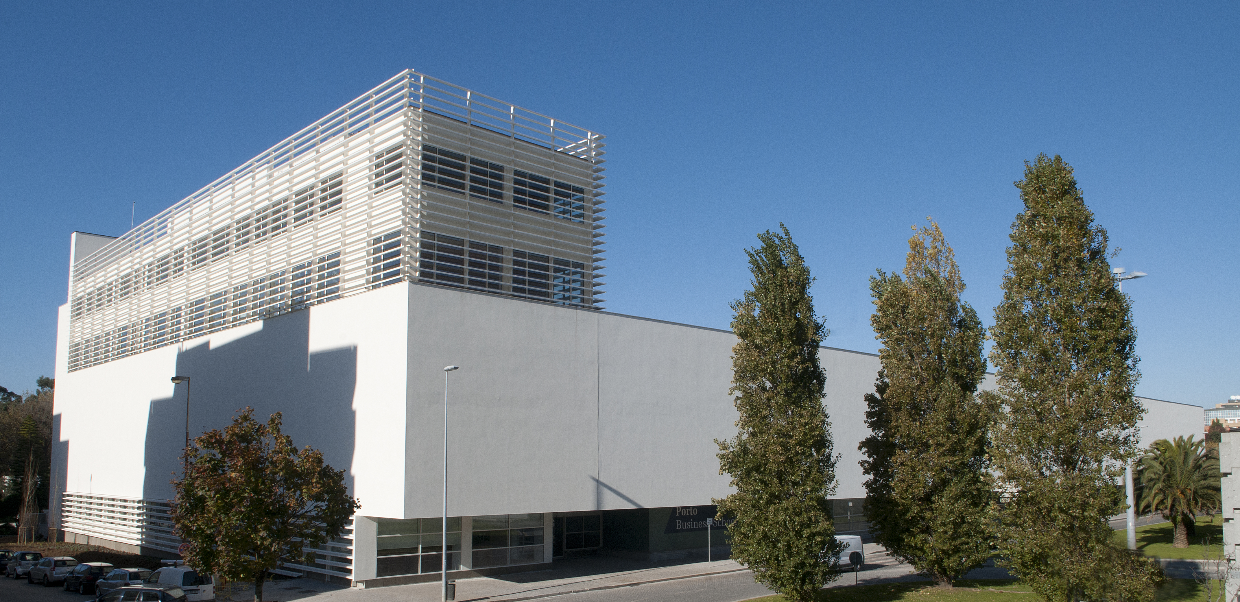 Instalações da Porto BUsiness School, situação na Avenida Fabril do Norte, 425 4460-312 Matosinhos